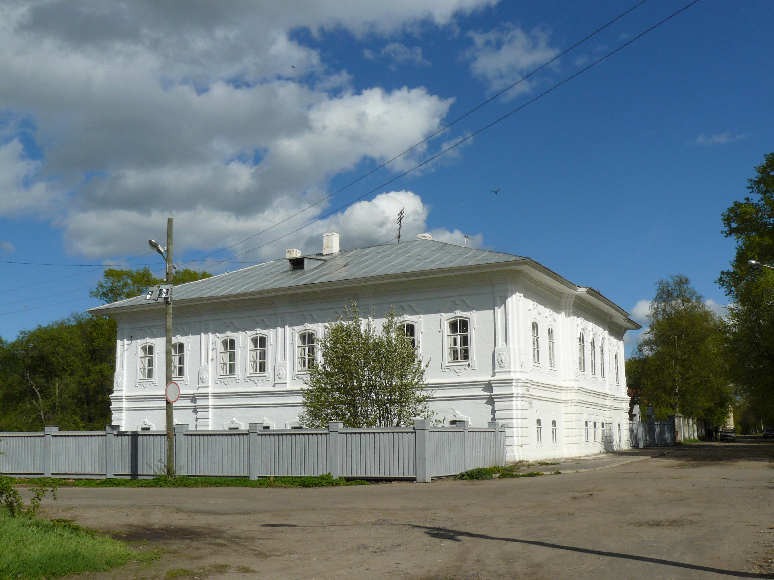 Дом ночлежный: набережная VI Армии, 87, Вологда, Вологодская область